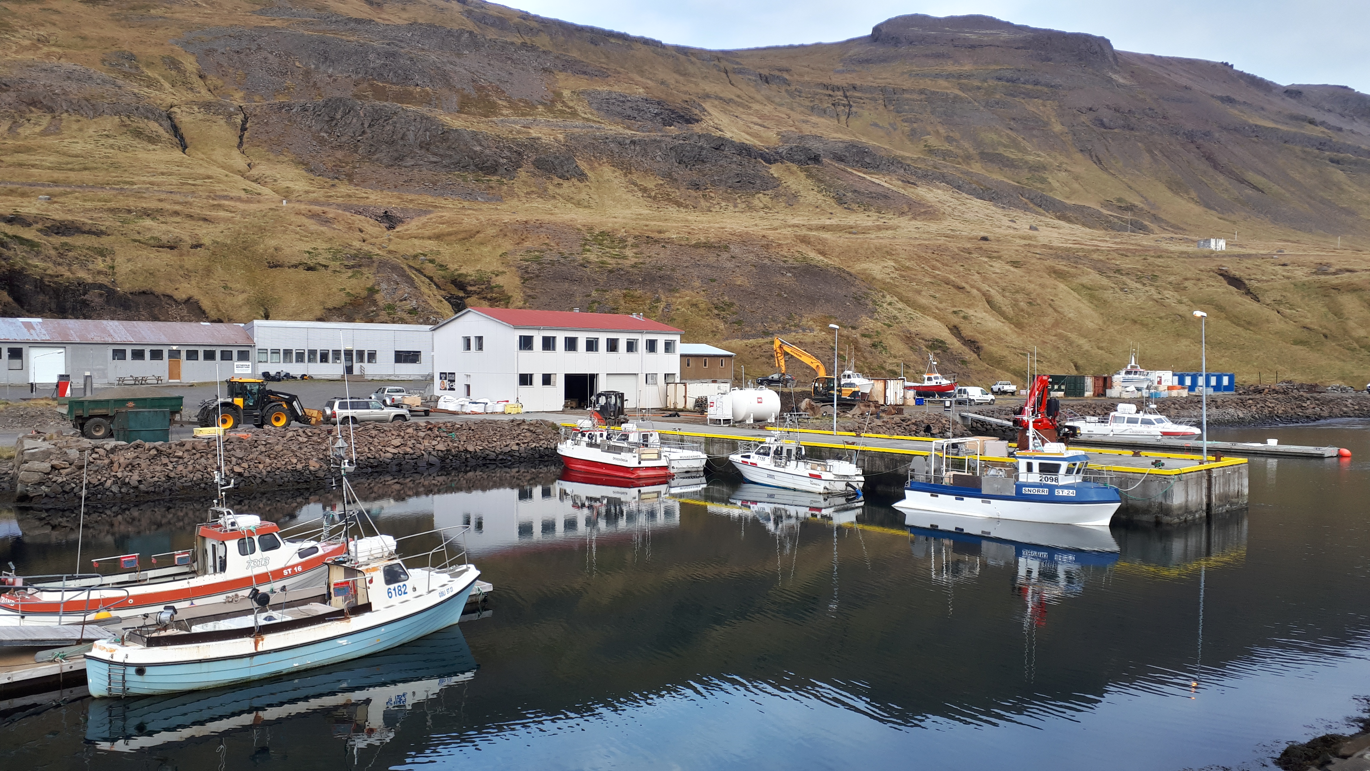 Port of Bergistangi in Iceland (municipality of Árneshreppur).